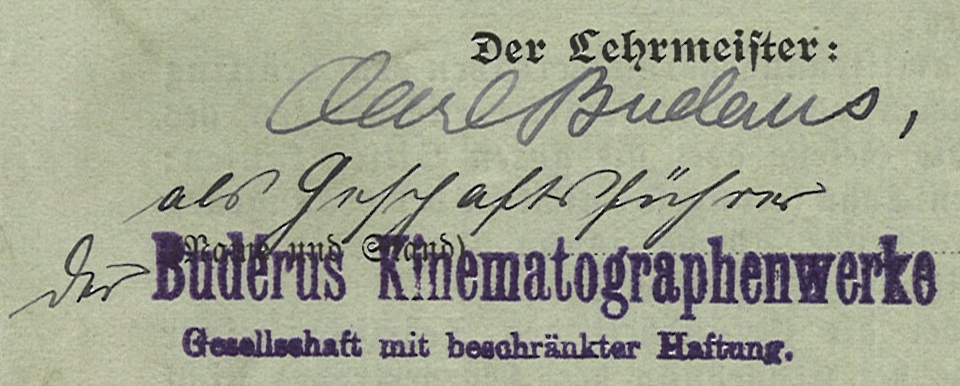 Mit eigenhändiger Unterschrift: "Der Lehrmeister Carl Buderus als Geschäftsführer der Budérus Kinematographenwerke Gesellschaft mit beschrankter Haftung" ...